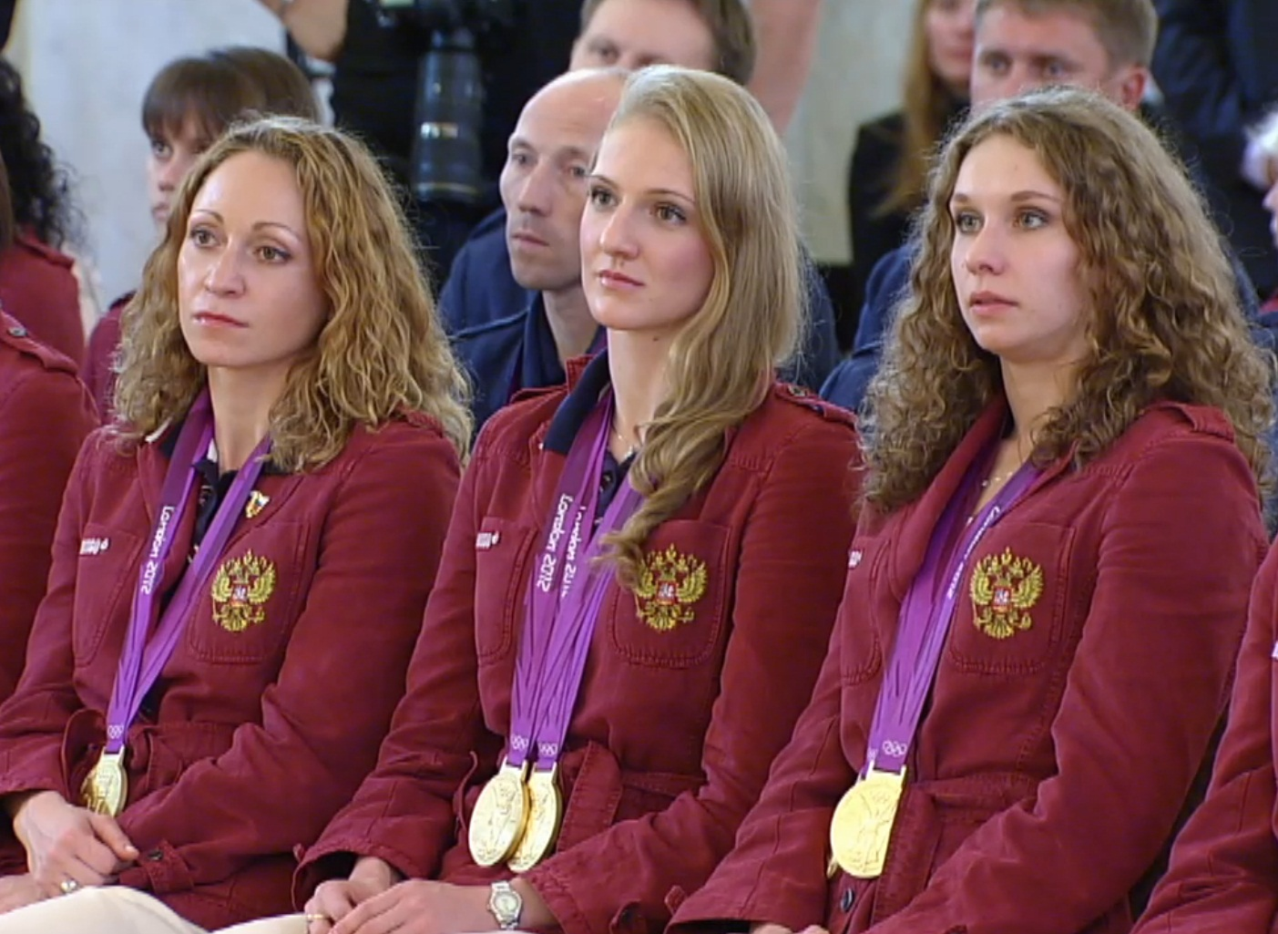 Встреча победителей и призёров Олимпийских игр 2012 года с президентом России на вручении государственных наград 16 августа 2012